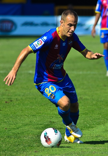 El futbolista granota Juanlu